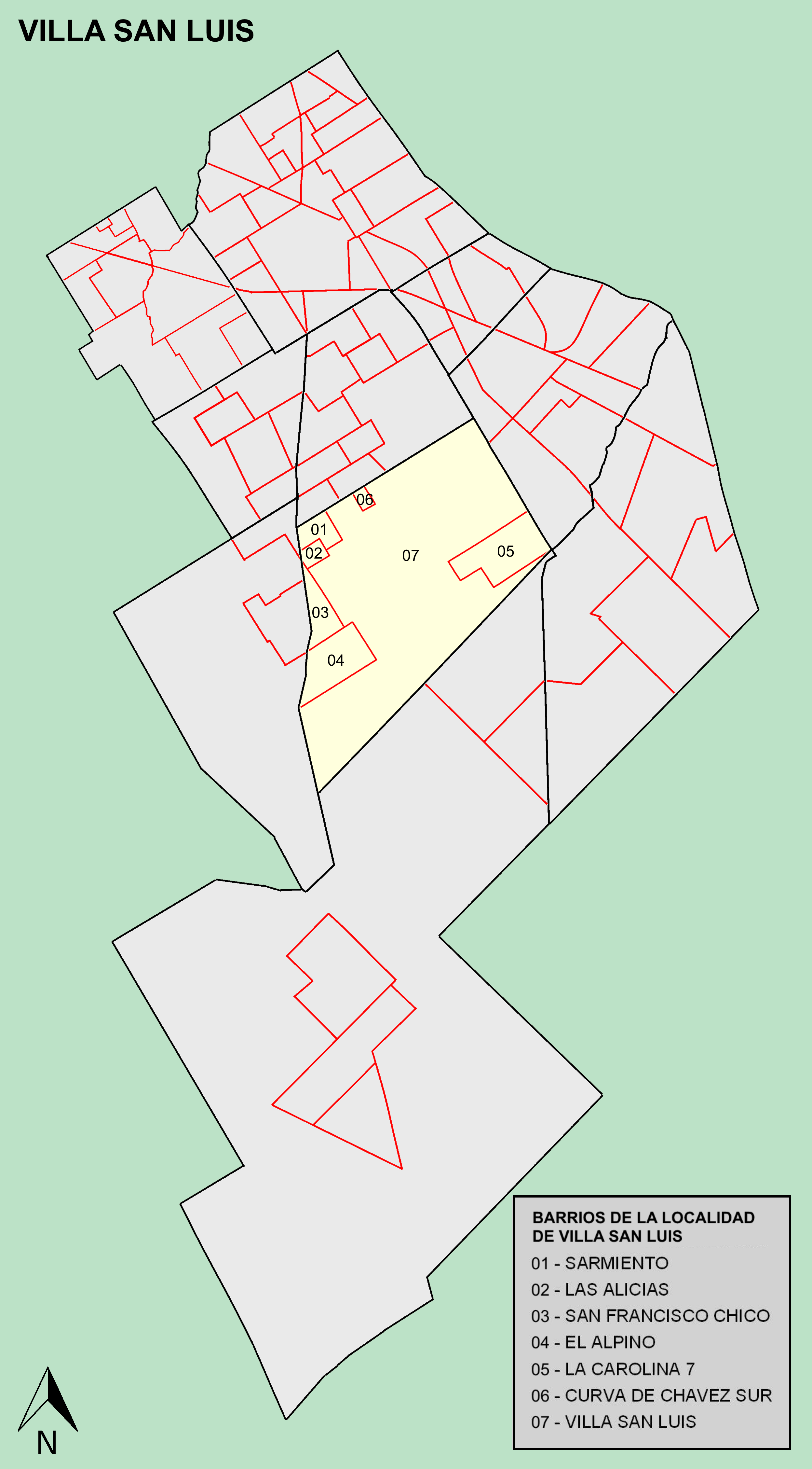 Mapa barrios de Villa San Luis